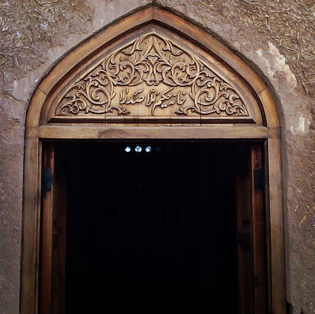 This is entrance of an old house in a village called Kahak (near the city of Qom, Iran) where Mulla Sadra used to live in when he was exiled due to some of his ideas.